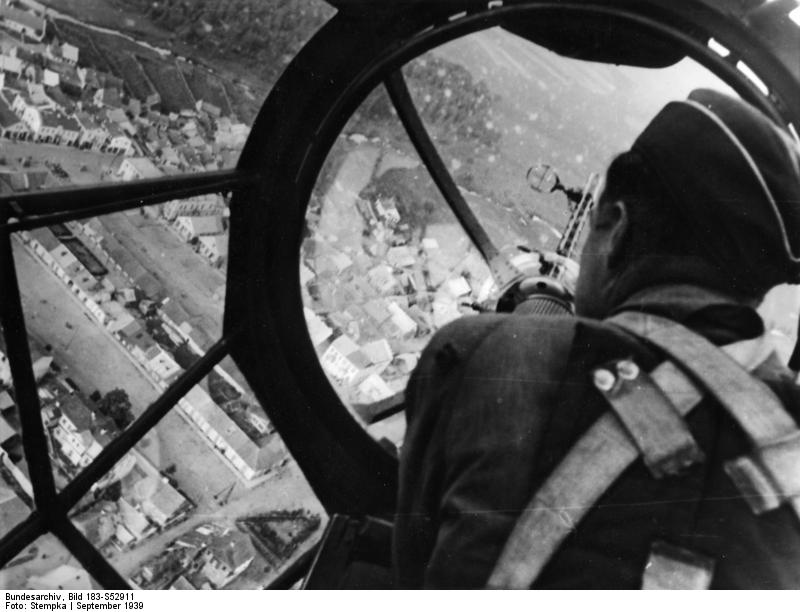 "Auftrag erfüllt-Brücke zerstört!" So sieht der Kampfflieger durch die Bugkanzel eine polnische Stadt. 11576-39L PK-Stempka Scherl Bilderdienst